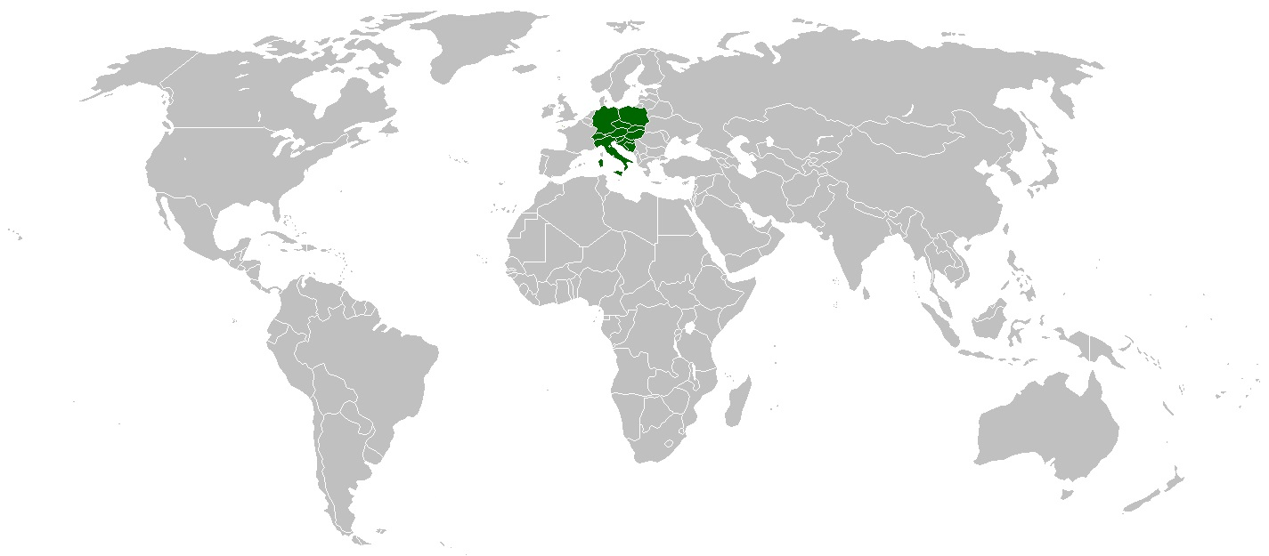 Stav rozšíření společnosti OBI v roce 2018